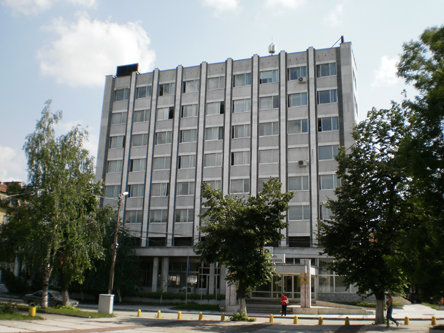 Сграда общинска администрация - Бяла Слатина